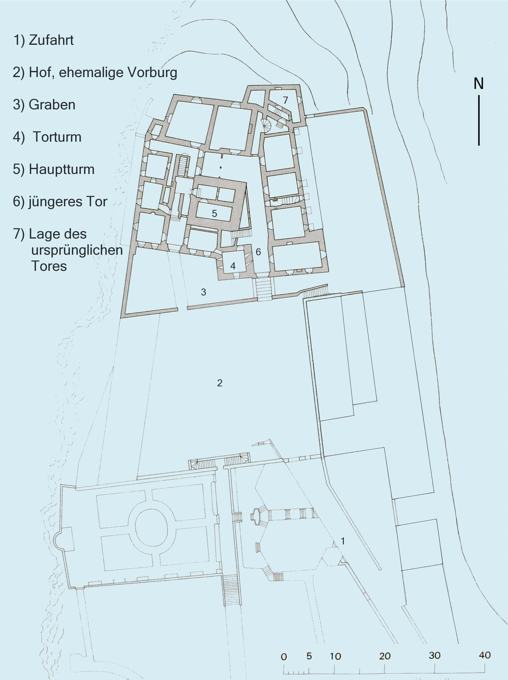 {Schloss Ortenstein: Plan